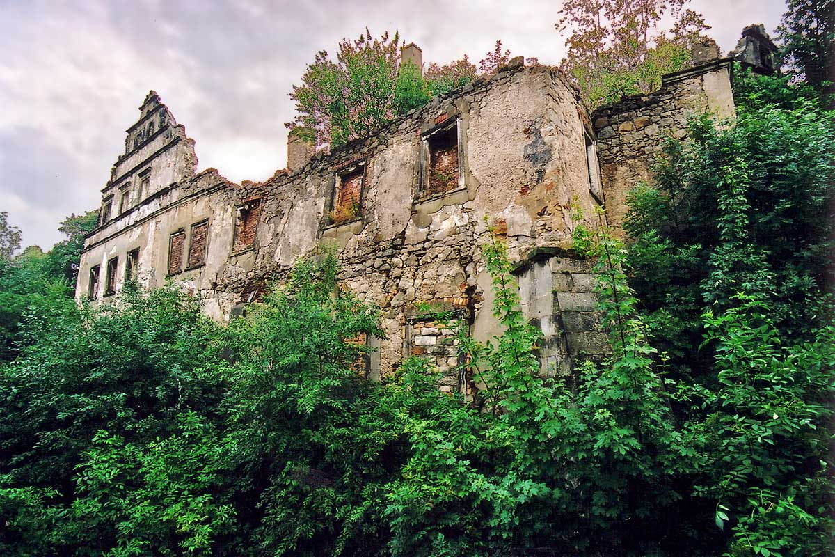 Gościszów - ruina zamku, XVII, XIX